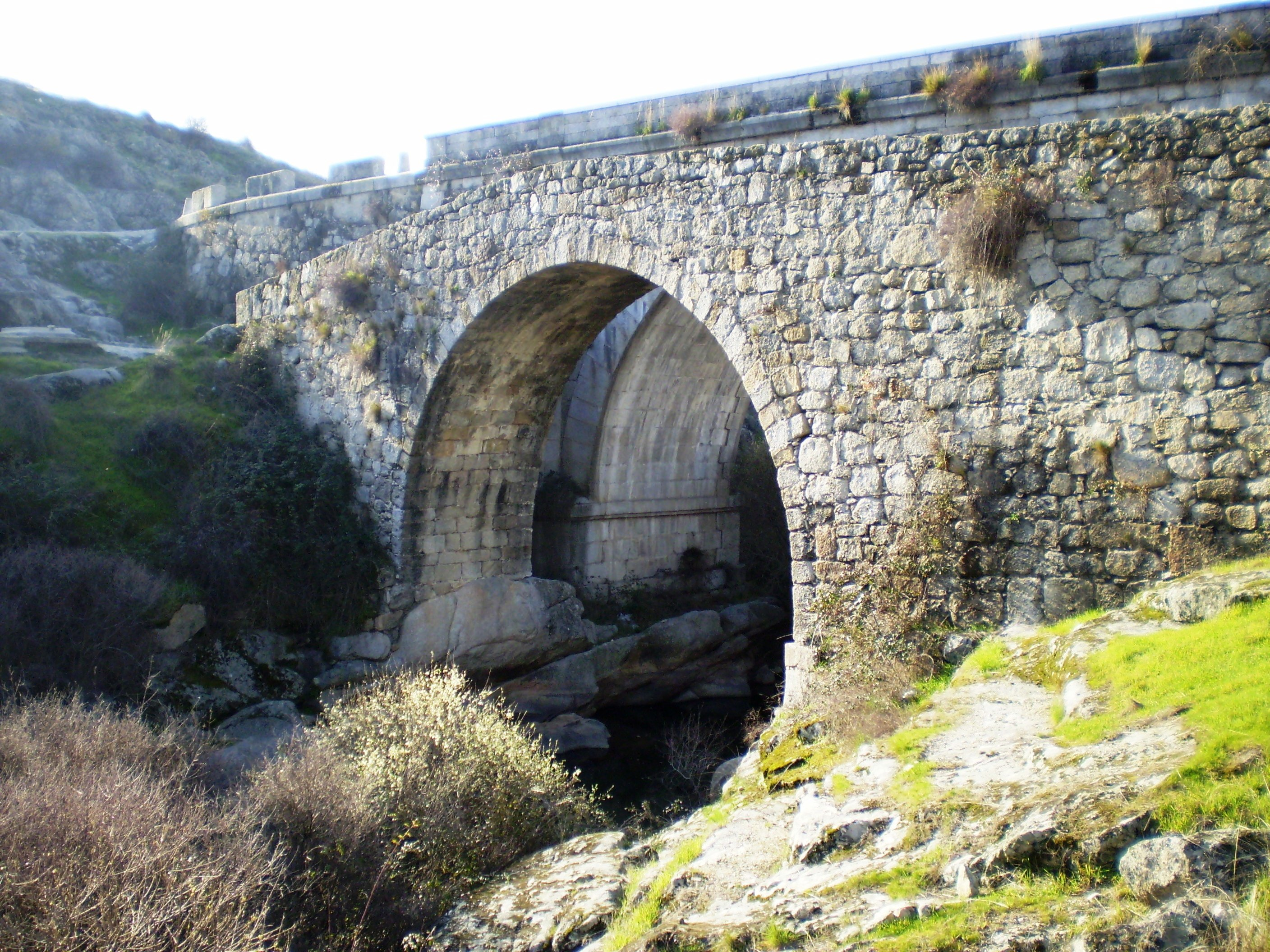 Grajal Bridge, over Manzanares River. Colmenar Viejo, Madrid, Spain